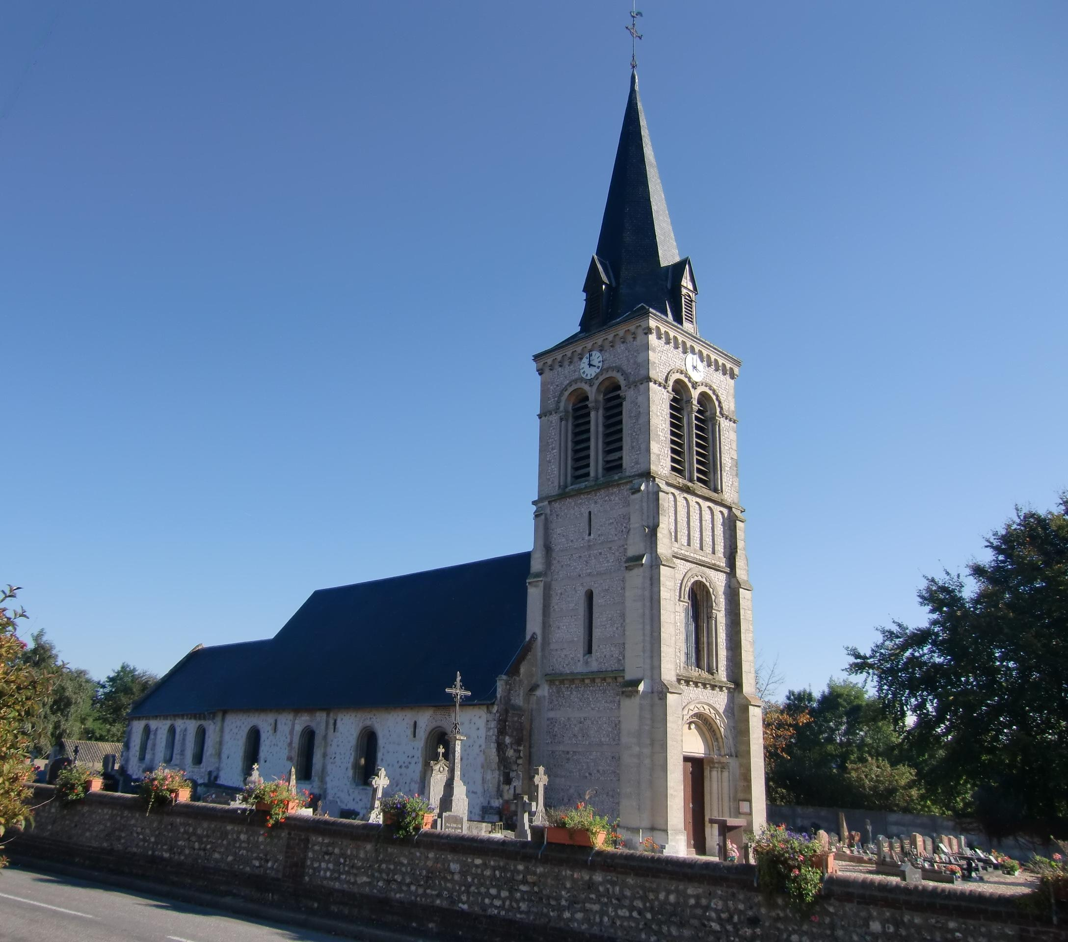 Église Notre-Dame de Trouville-la-Haule (Eure, Normandie, France)